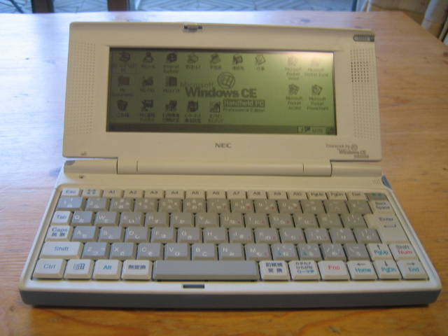 NEC モバイルギア2 MC/R330